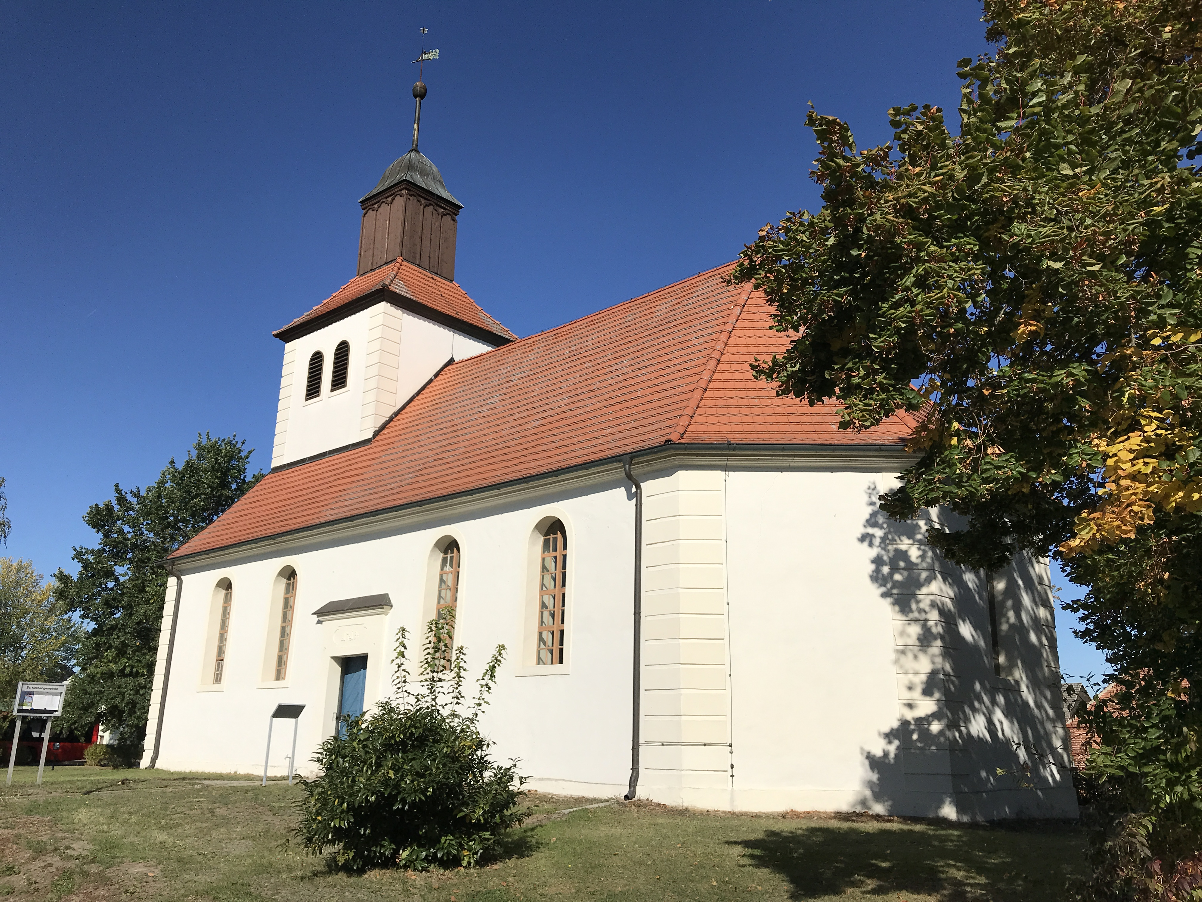 Die Dorfkirche Mixdorf in der gleichnamigen Gemeinde im Landkreis Oder-Spree ist eine Saalkirche aus den Jahren 1719/1720. Im Innern steht unter anderem ein Kanzelaltar aus dem Jahr 1725.